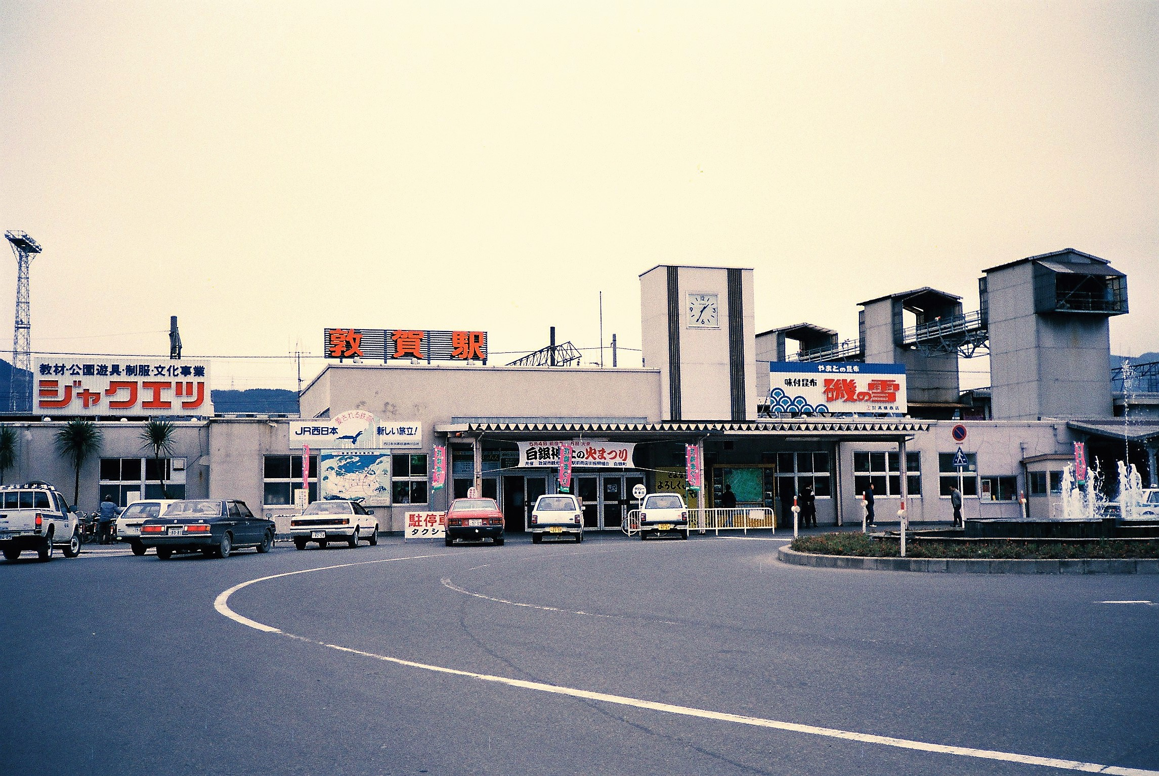 敦賀駅（1987年4月撮影）